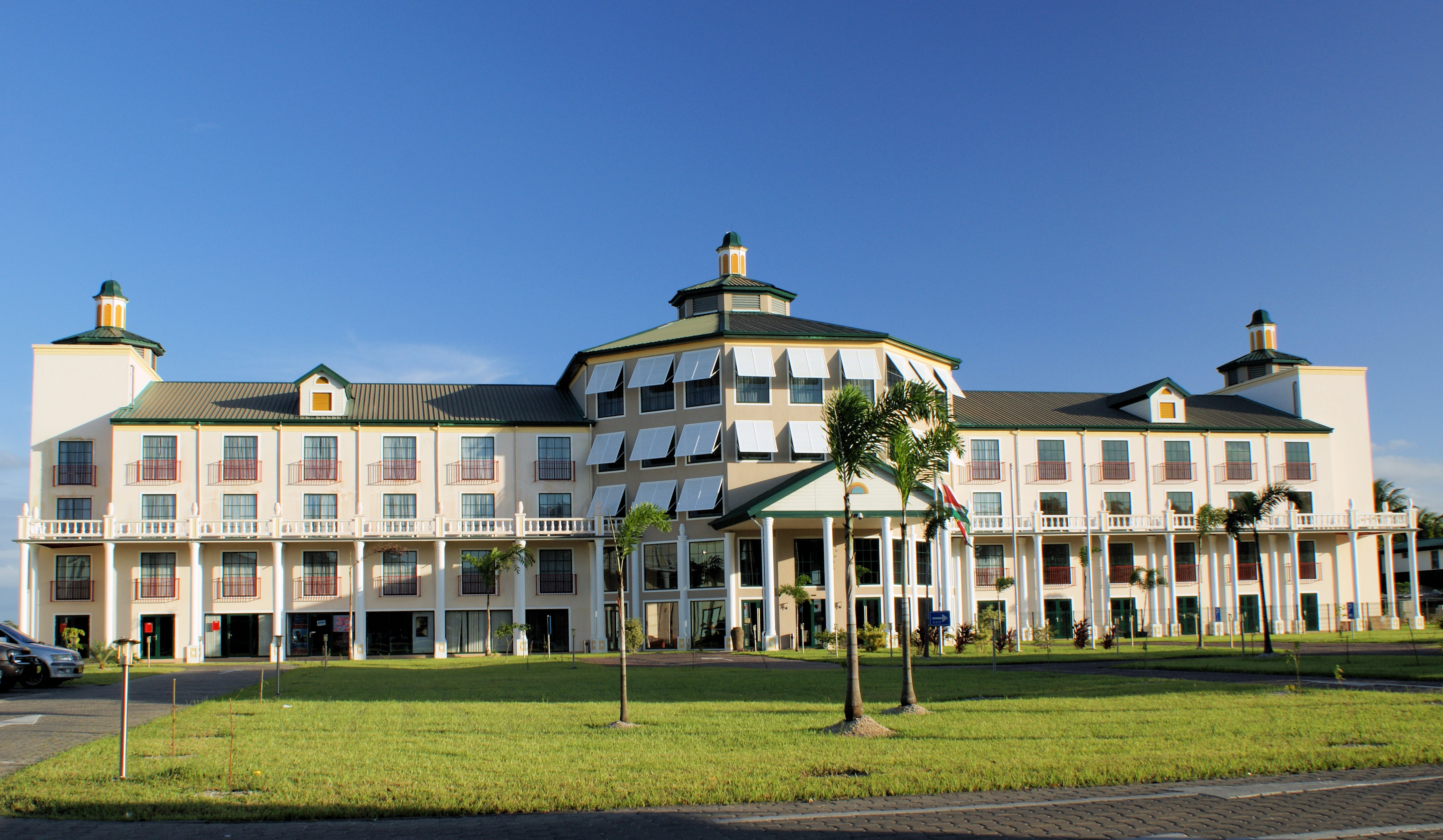 Отель Royal Torarica (Парамарибо)